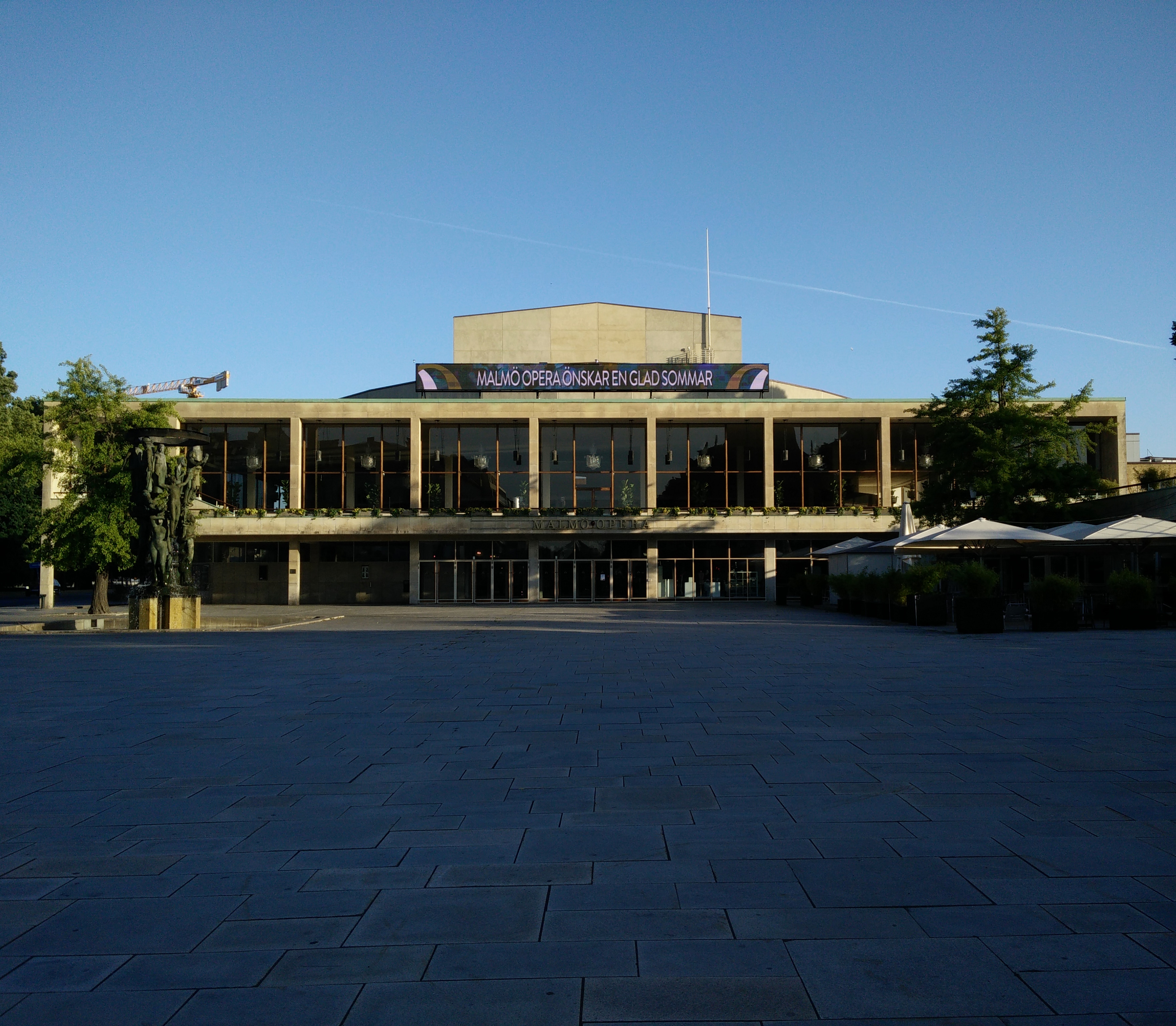 Malmö, operahuset.